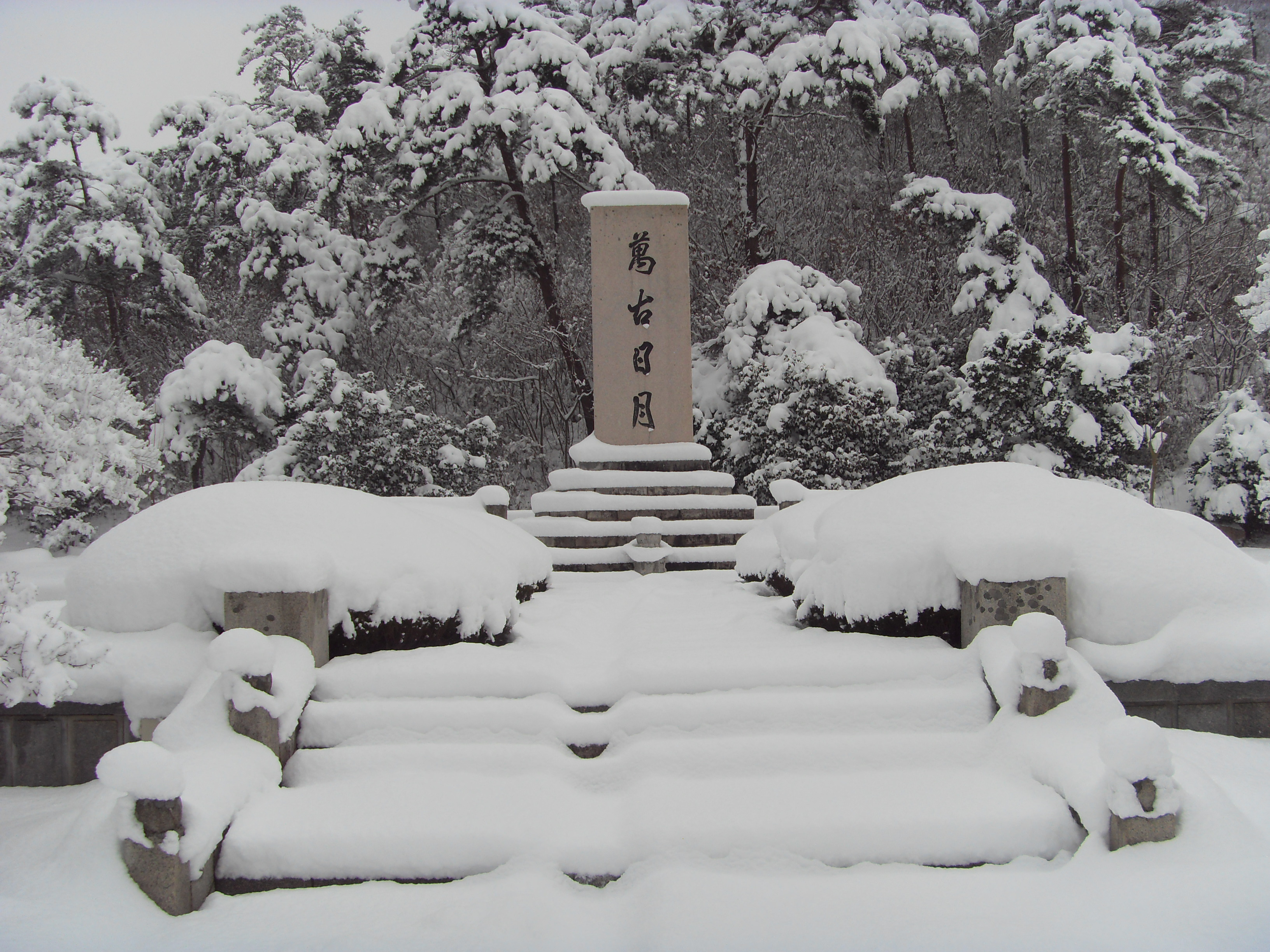 Памятный знак на месте обретения просветления Сотэсаном